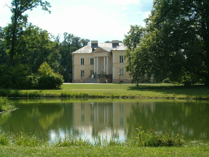 Dobrzyca, ul. Pleszewska 5A - pałac z lat 1789-1790, elewacja frontowa (zabytek nr A/7)